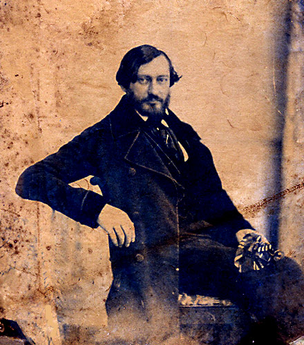 Эдуард Вильгельм Позе. Позитивное изображение с соляного негатива 1848 года. Негатив хранится в архиве городского музея Дюссельдорфа.